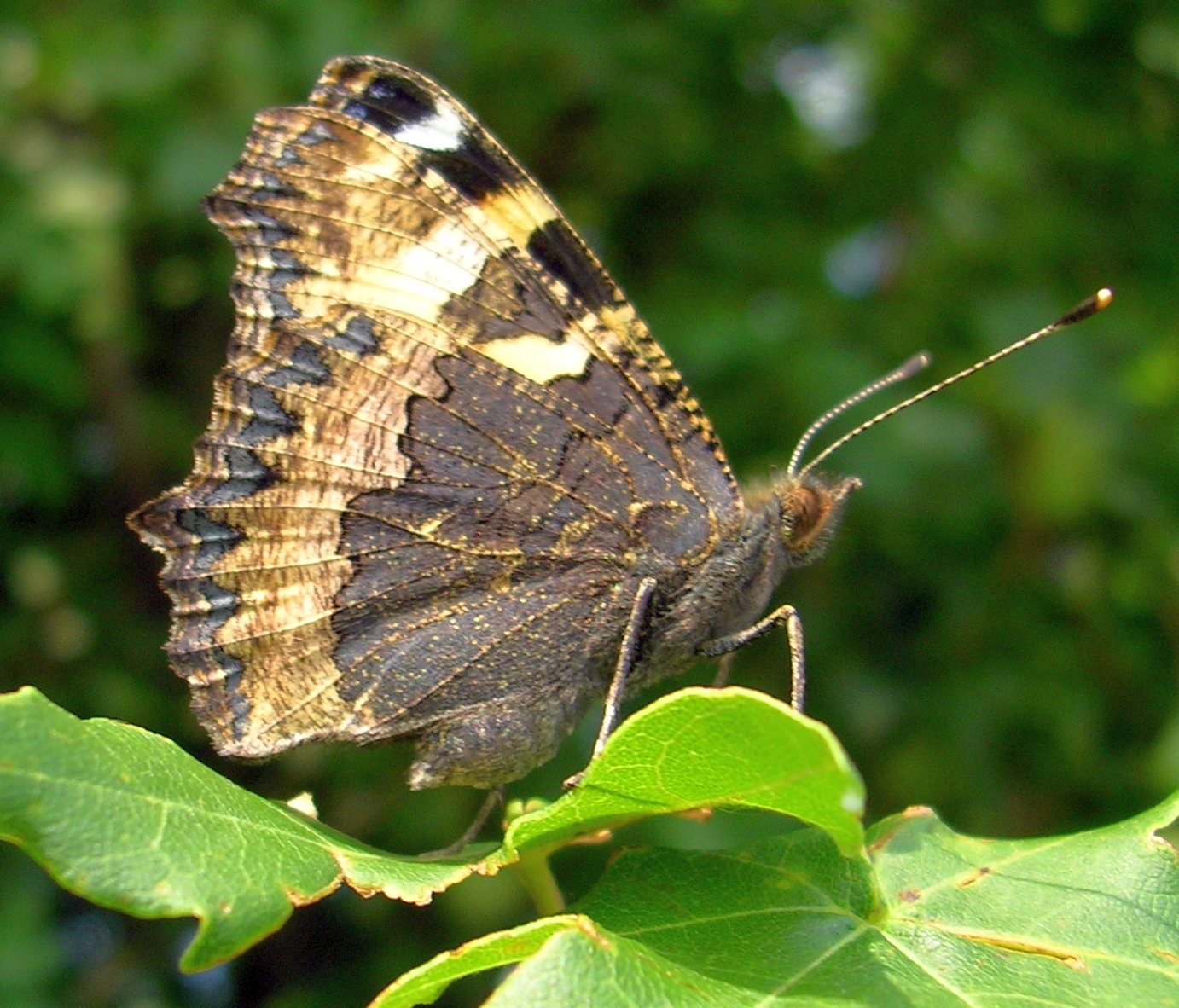 Aglais urticae (Kleiner Fuchs) FlügelunterseiteBellevue-Höhe Wien